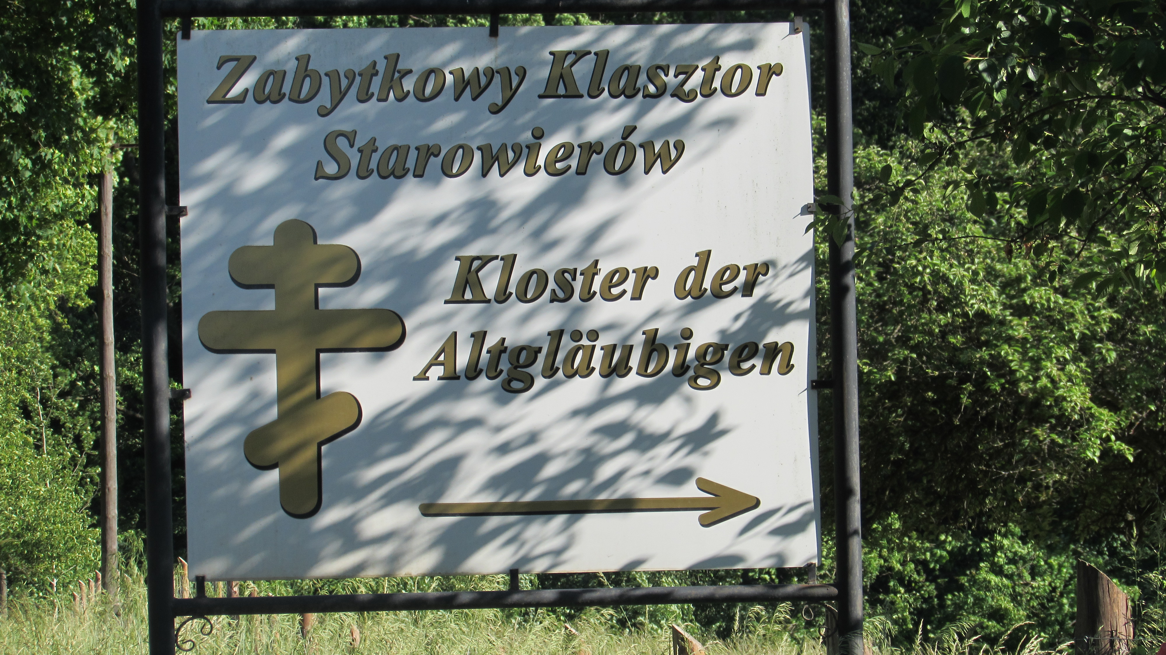 Wojnowo Kloster Der Altgläubigen Schild